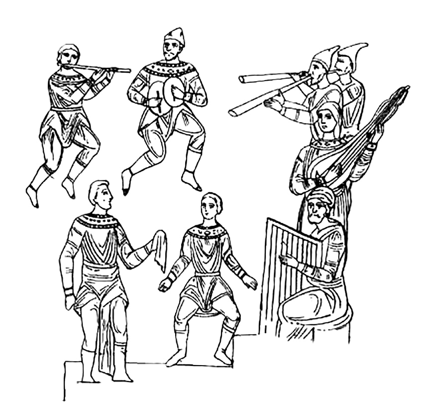 Музыканты и скоморохи. Фреска Софийского собора в Киеве. Прорись В.А. Прохорова. Начало 1870-х гг.